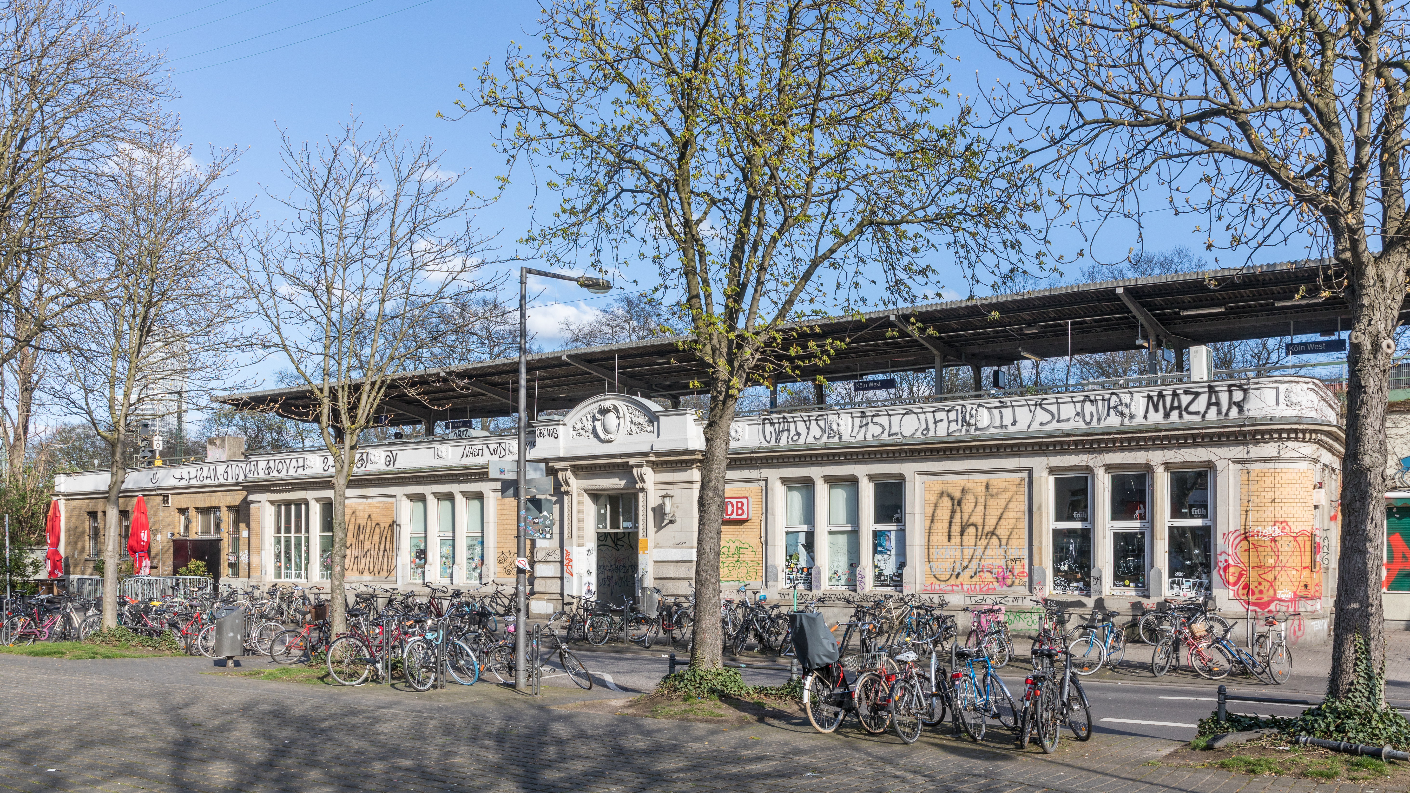 Empfangsgebäude des Bahnhofs Köln-West